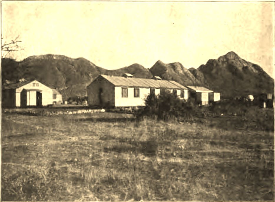 Genesungsheim Abbabis